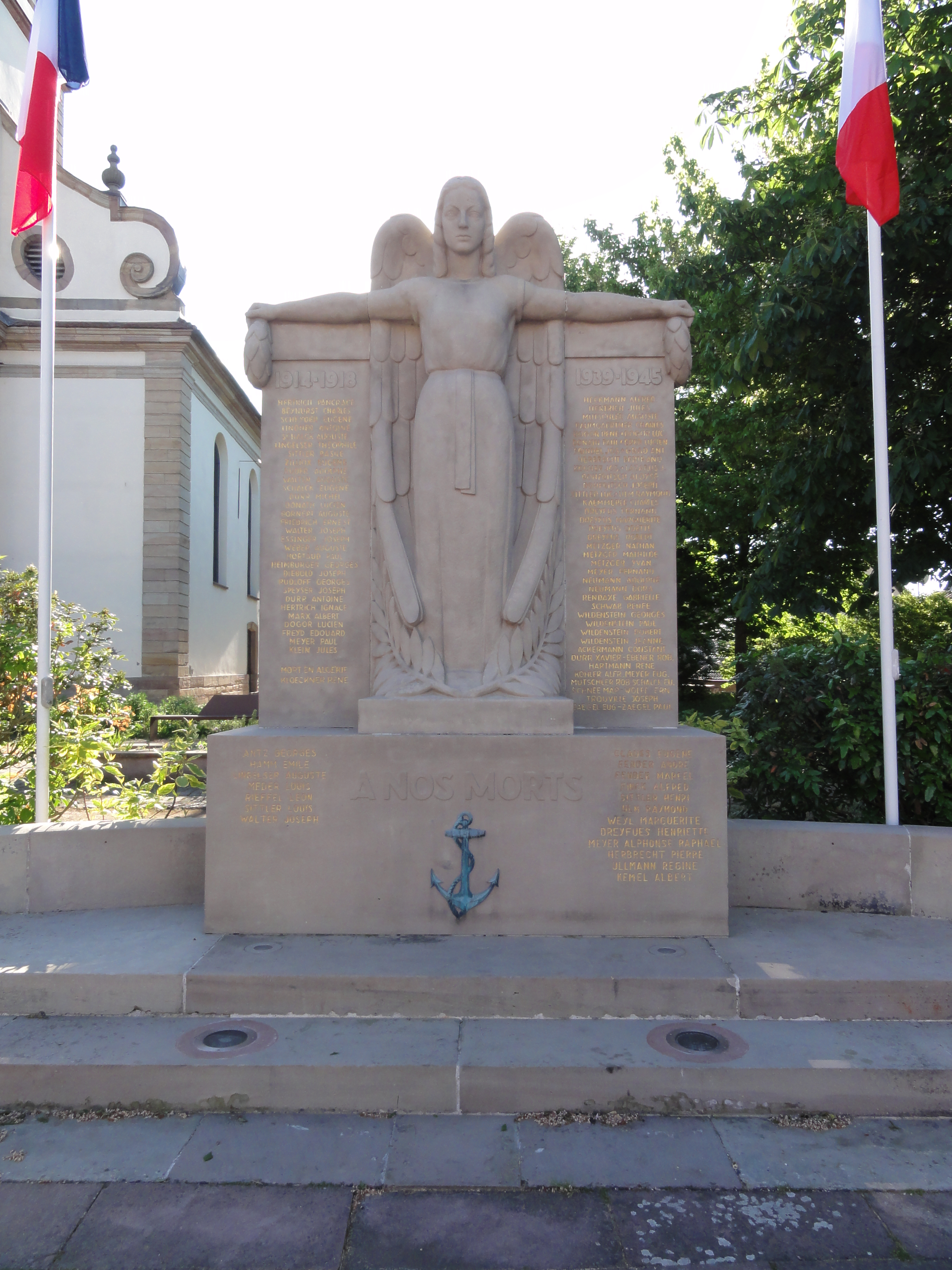 Fegersheim (Bas-Rhin) monument aux morts